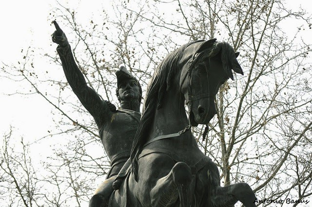 Monumento al libertado Gral. José de San Martín, situado en el Parque del Oeste, Madrid, España.